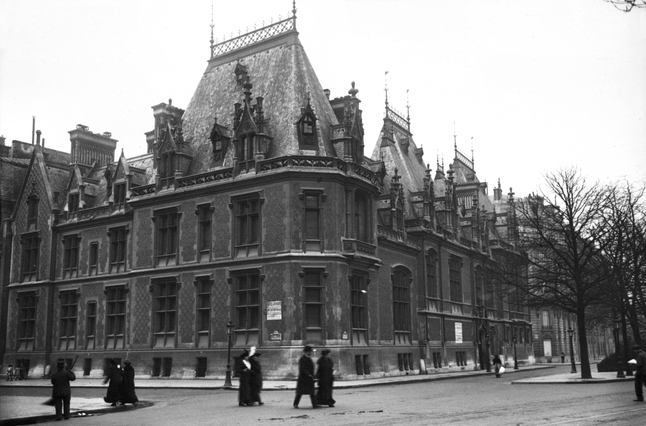 Mise en vente de l'hôtel Gaillard (hôtel particulier), place Malesherbes (actuelle place du Général-Catroux), Paris 17e, en 1913.